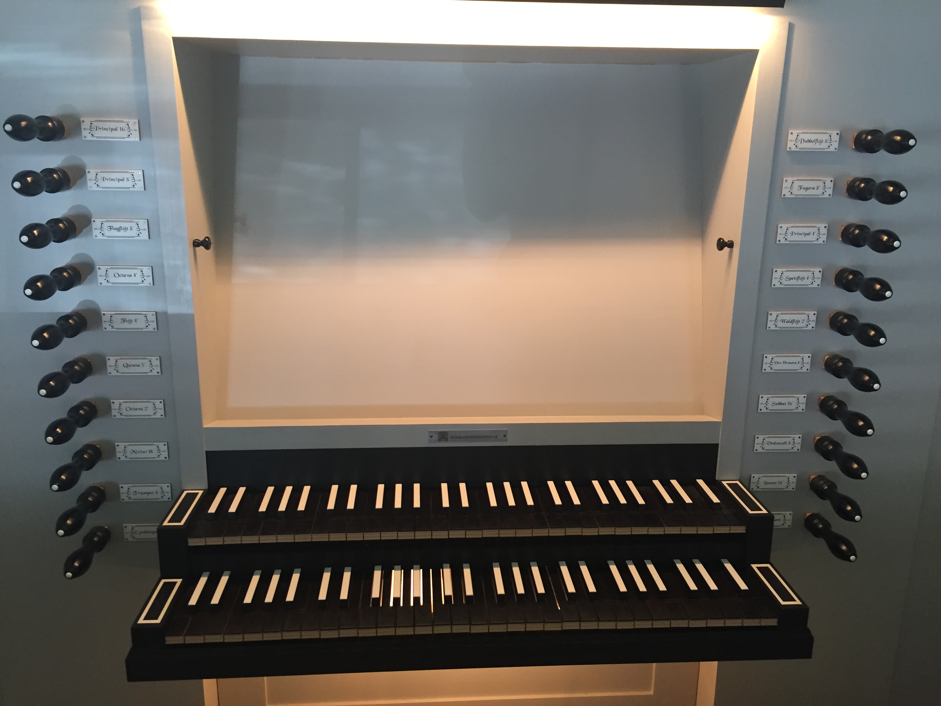 Ryssby kyrka, Kalmar län. Läktarorgelns spelbord.